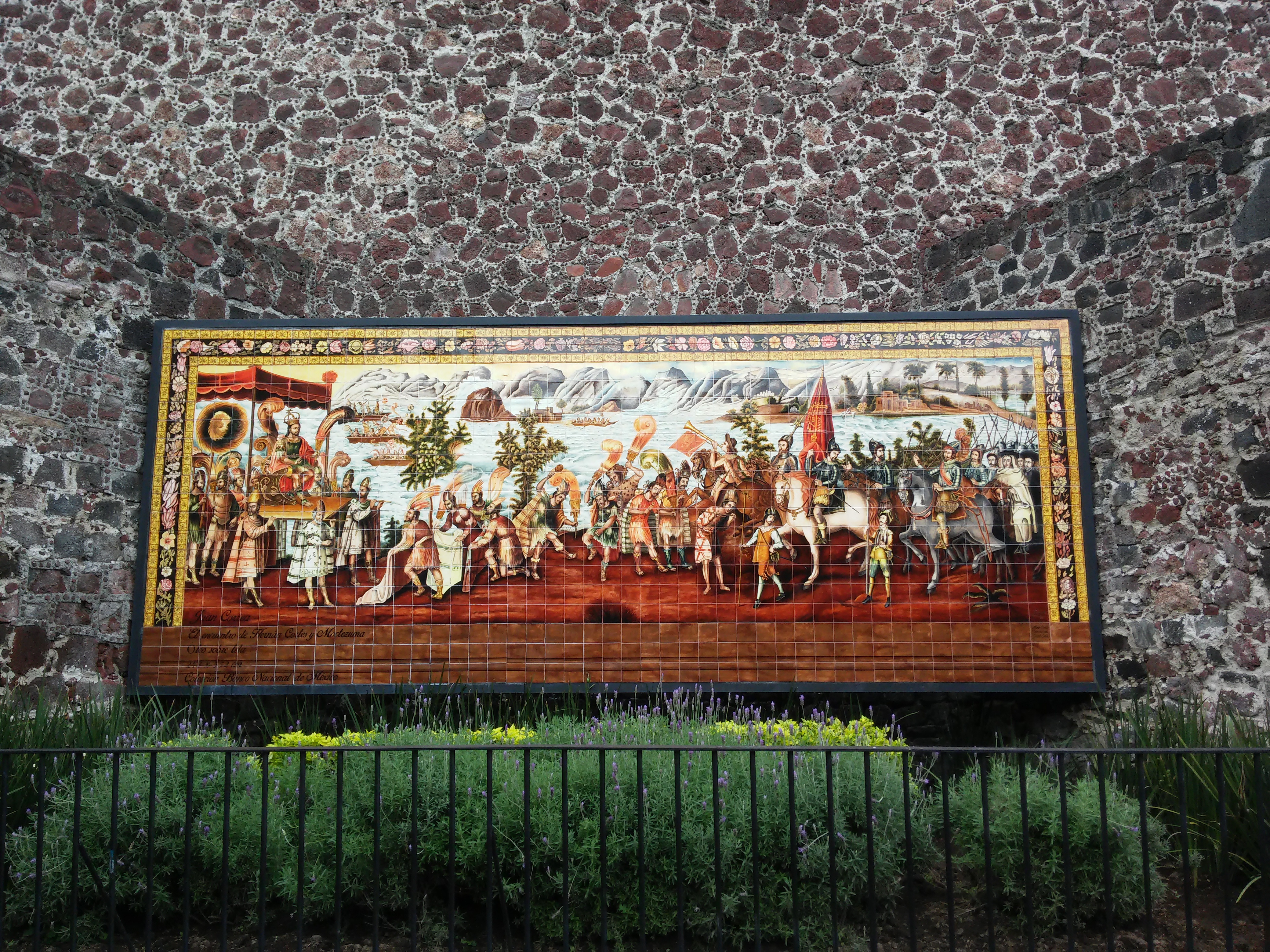 Monumento en la calle Pino Suárez en el centro histórico de la ciudad de México que señala el sitio en el que Moctezuma Xocoyotzin recibió a los españoles, en 1519